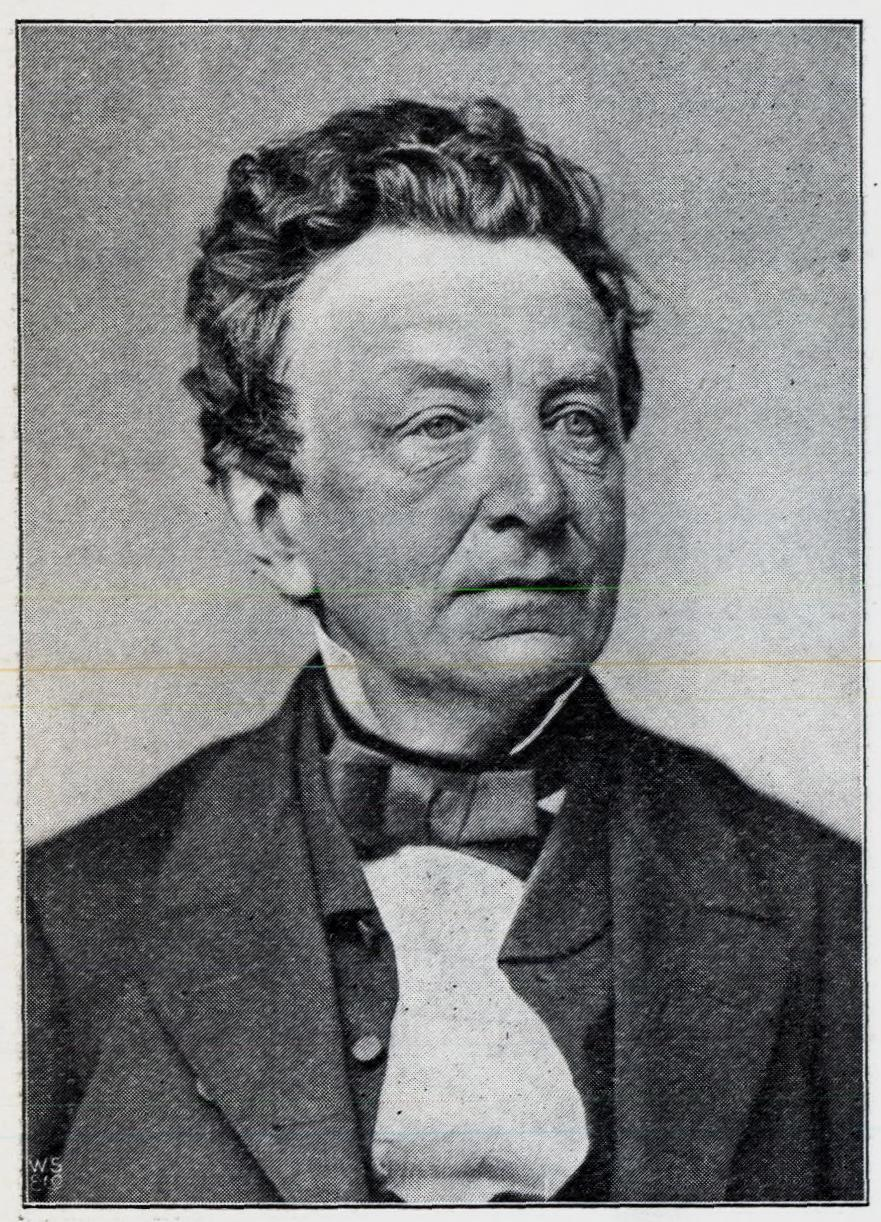 Illustrasjon hentet fra boken "En Christianiensers Erindringer fra 1850- og 60-Aarene" av Nielsen, Yngvar og utgitt av Gyldendal (Kristiania, 1910). Johan Dahl (1807-1877), bokhandler og forlegger, ga ut Den Constitutionelle.